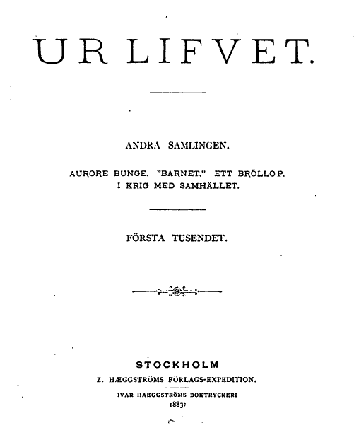 Försättsblad till Anne Charlotte Lefflers andra novellsamling under namnet Ur lifvet (1883).